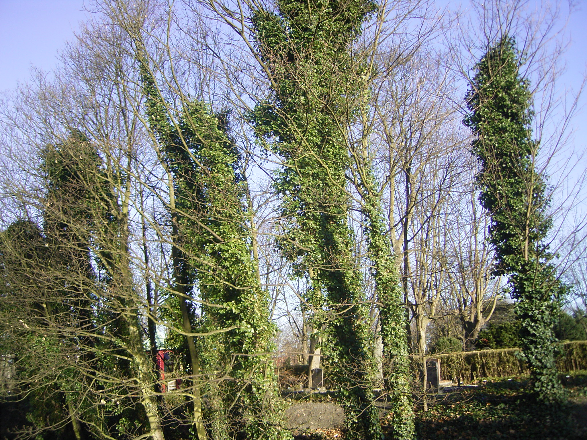 Deze foto toont de hulst die om een aantal bomen gekronkeld is. Ik nam de foto vandaag op de Laan van eik en duinen in Den Haag. This photo shows Hedera helix climbing up around some trees. I took the photo today in The Hague, Netherlands.